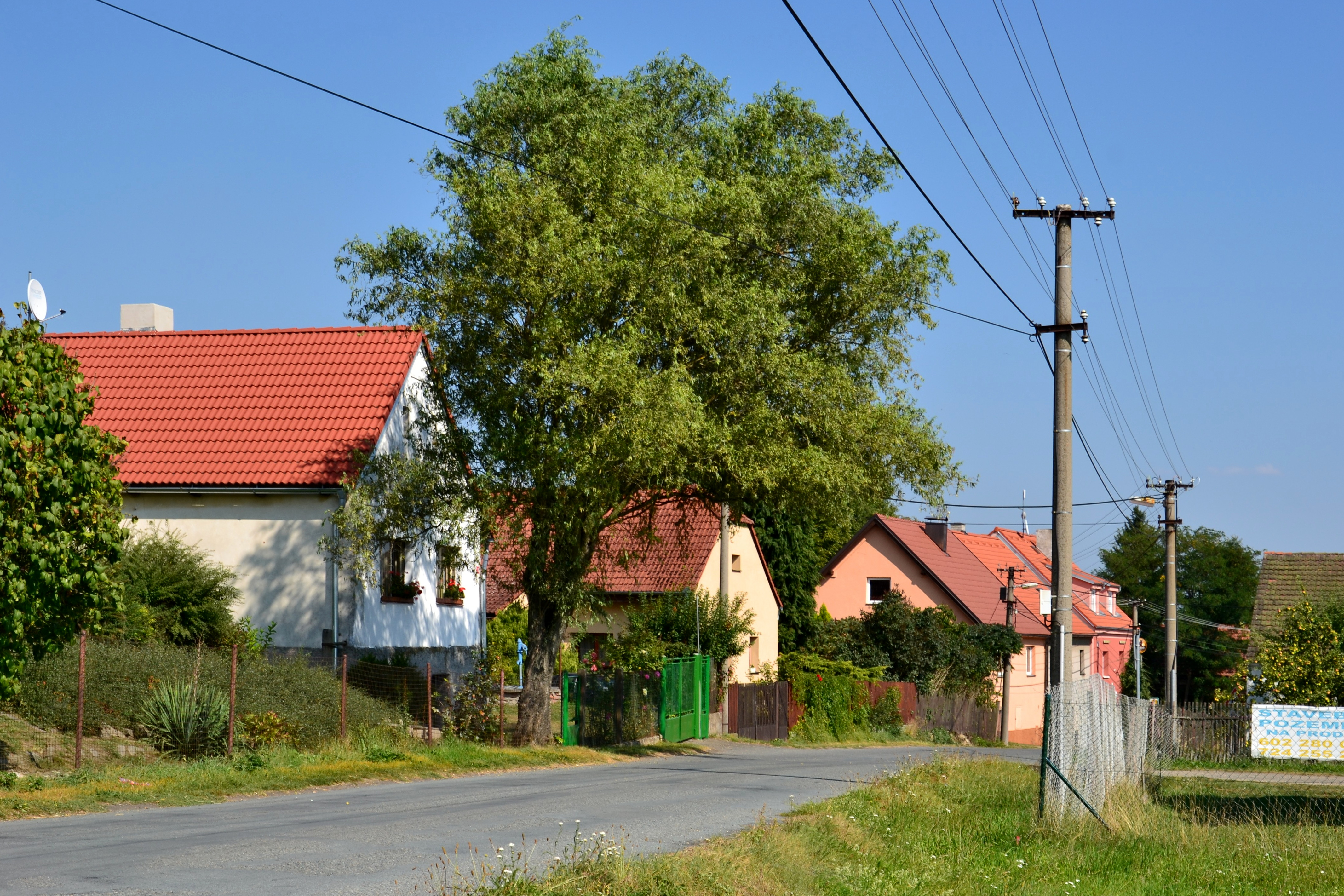 Západní okraj vesnice